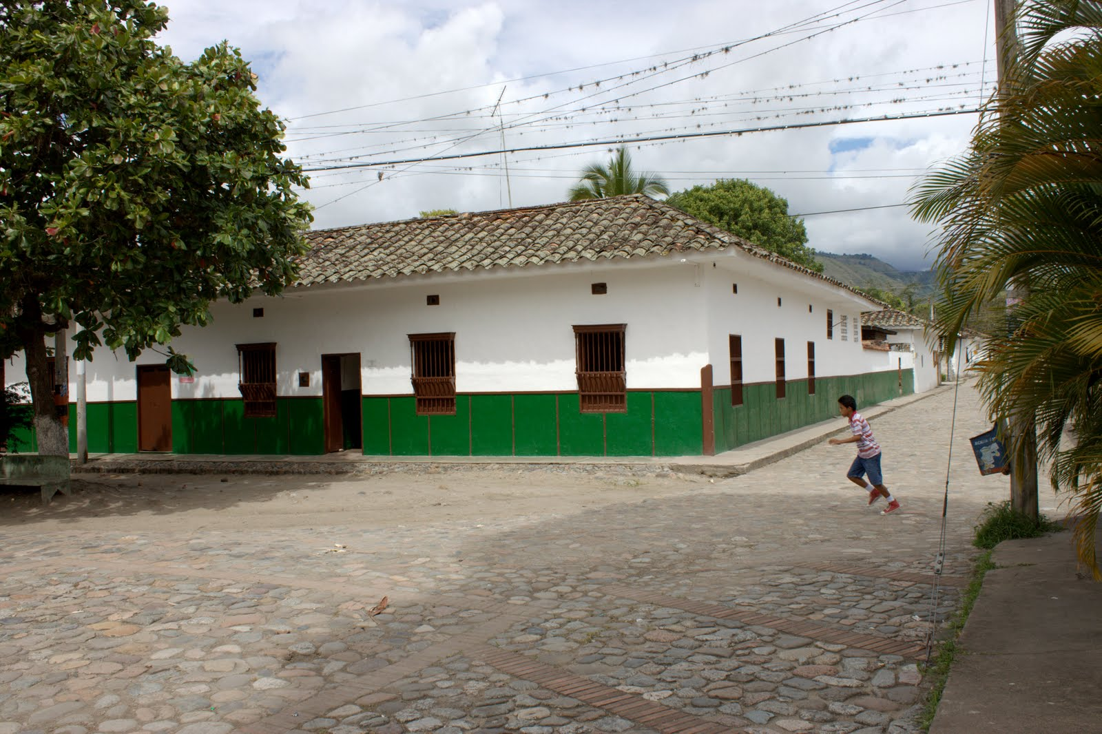 La Jagua